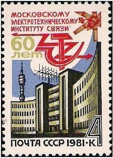 Почтовая марка СССР 1978 г. № 4891. Институт связи